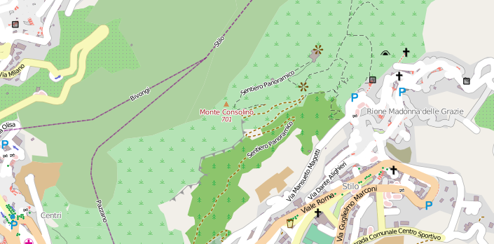 Stilo Monte Consolino osm 01 gen 2013